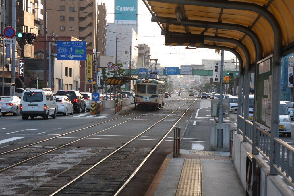 知寄町一丁目停留場